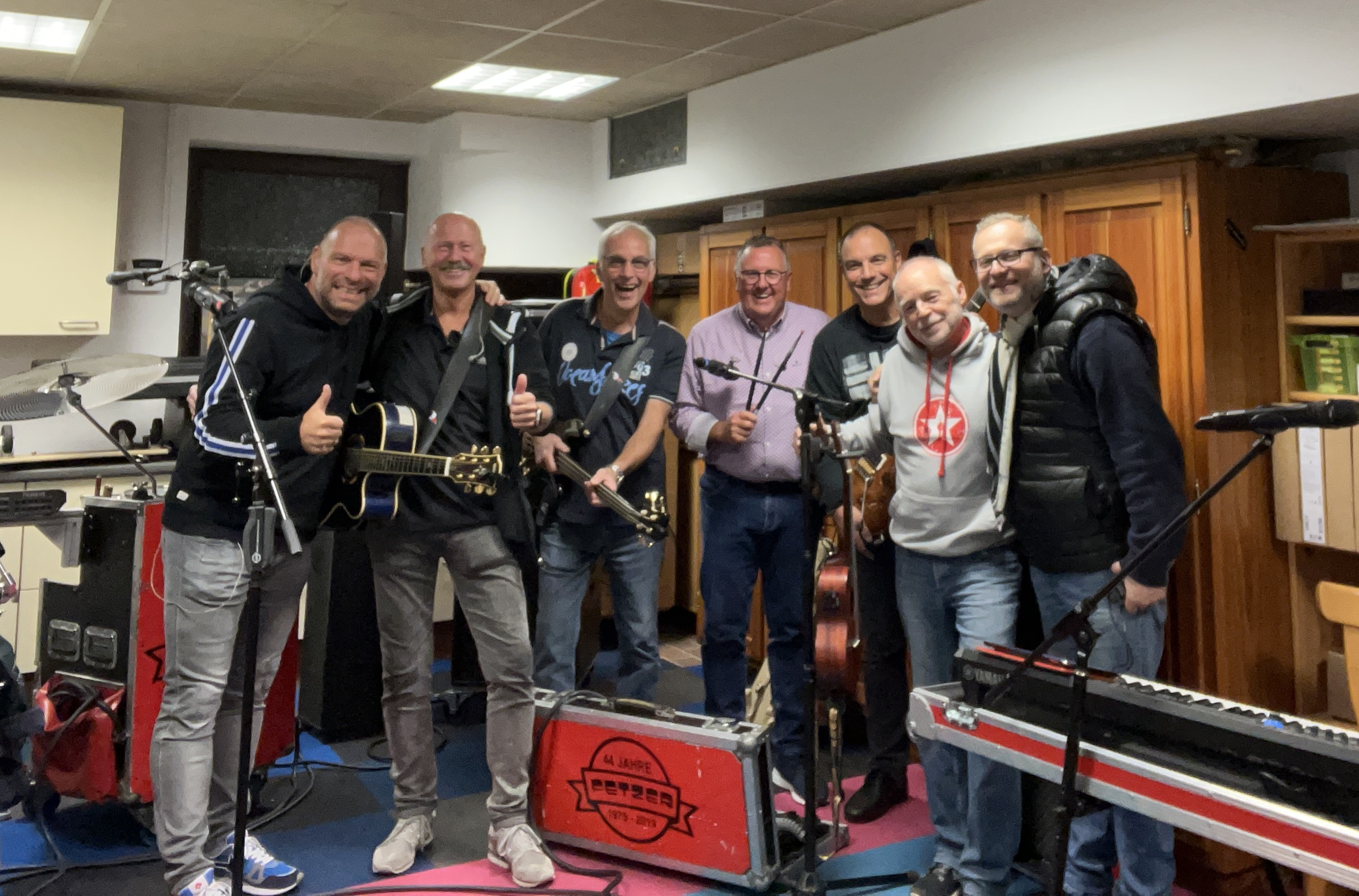 Hintertux, Tenne, April 2018